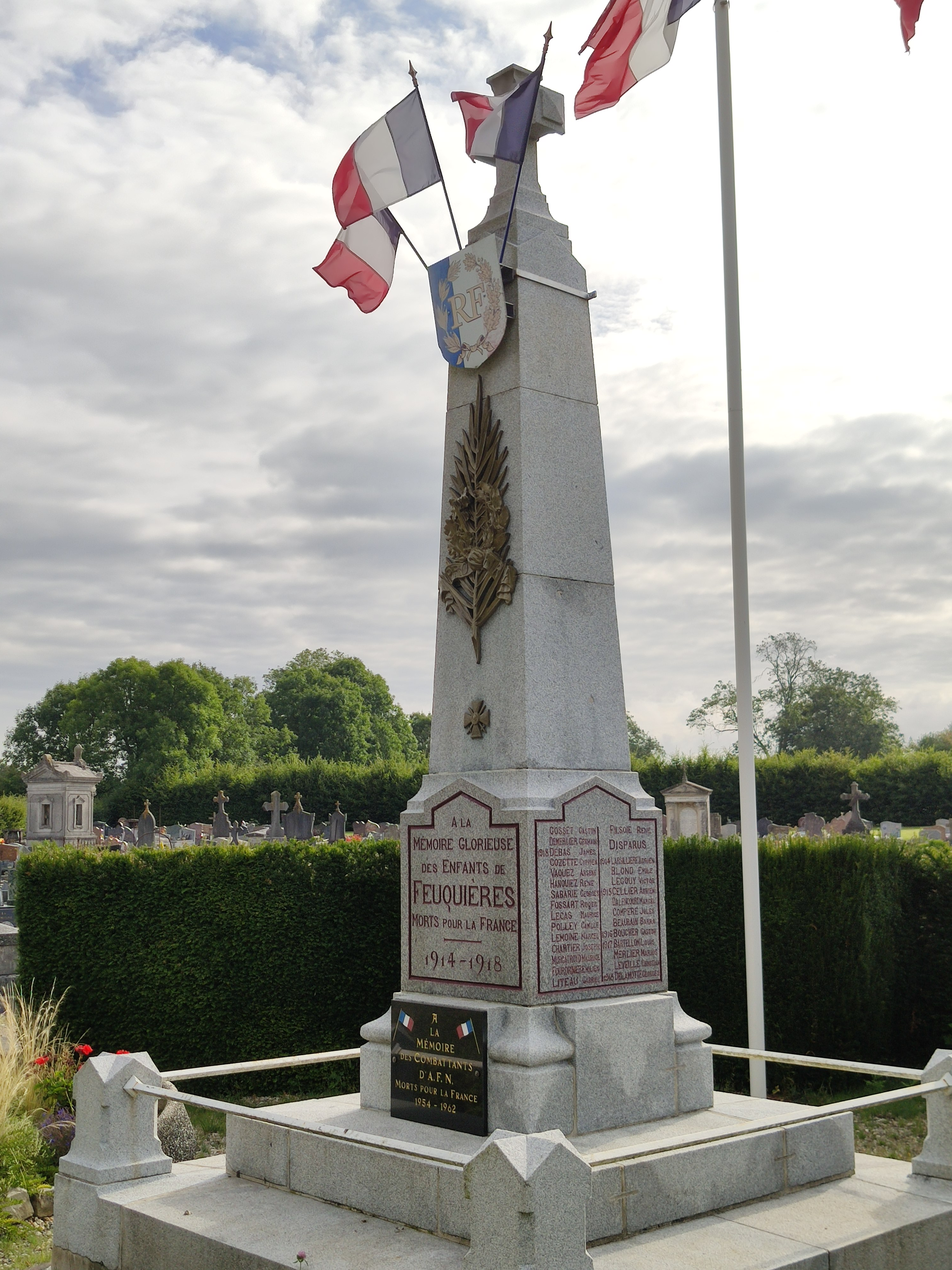 Feuquières (Oise) : Monument aux mort